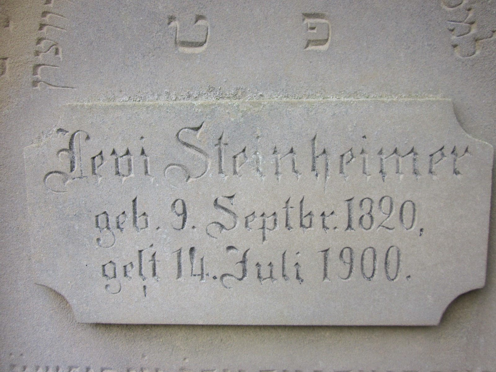 Bilder vom Euerbacher Judenfriedhof